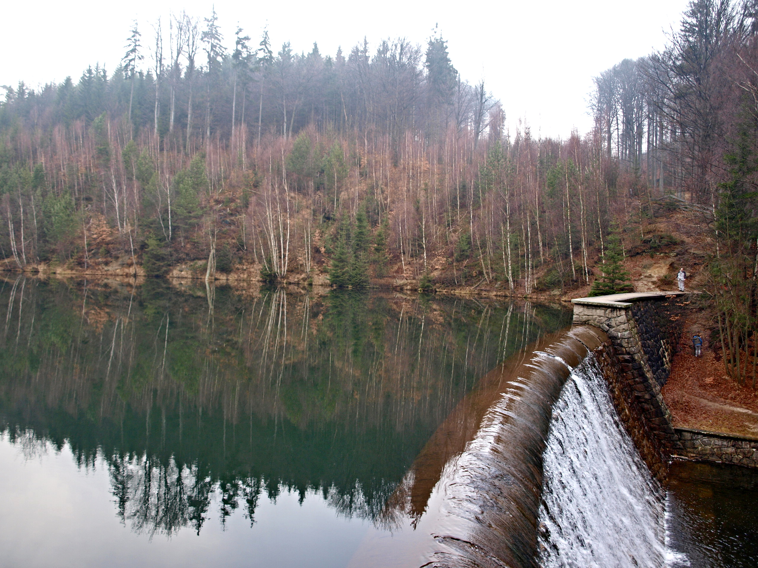 VN Naděje